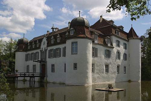 Weiherschloss Bottmingen (Restaurant)